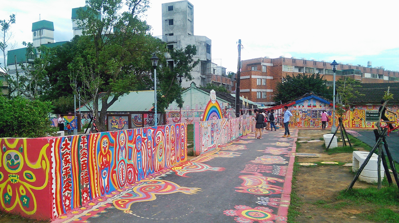 中文（台灣）: 彩虹藝術公園